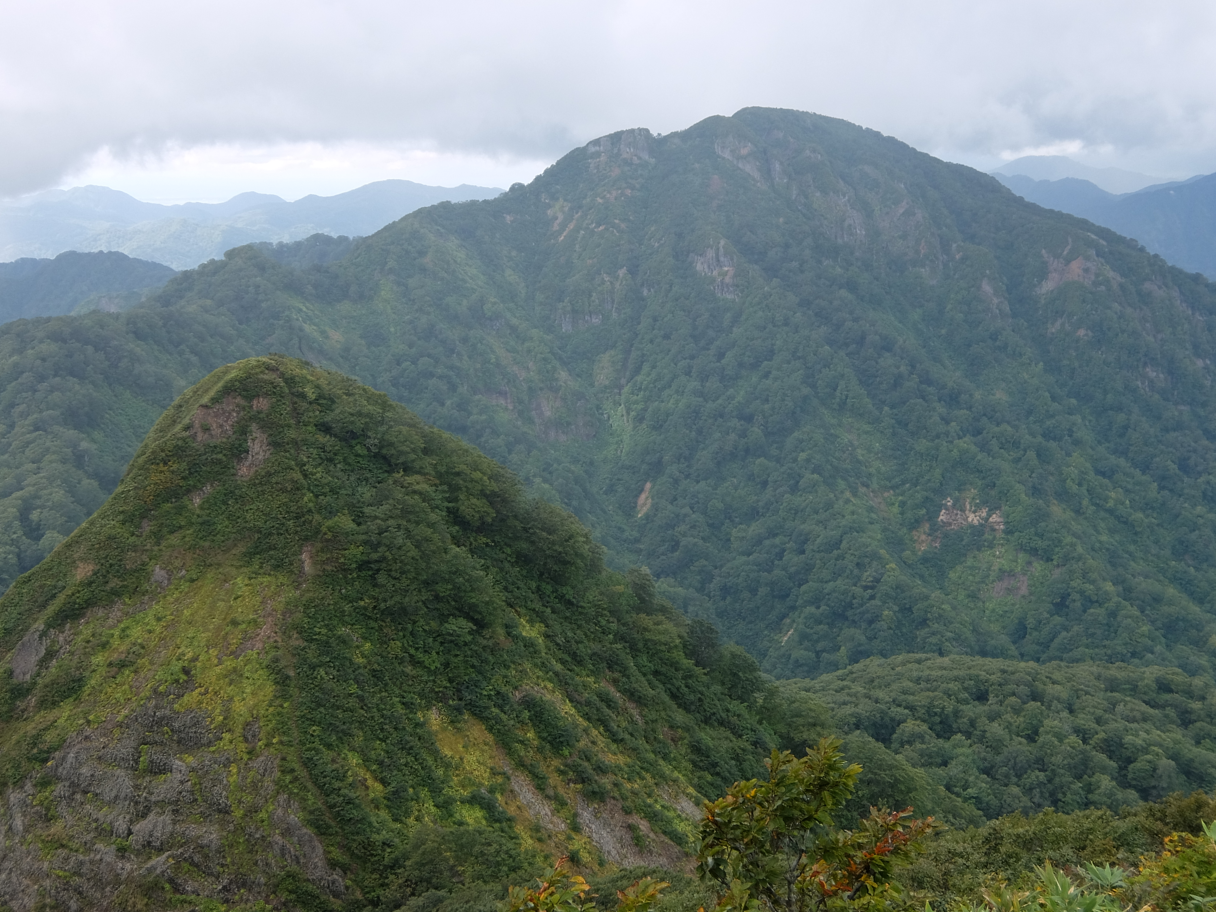 庄屋森から見た丁岳 左の山は萱森